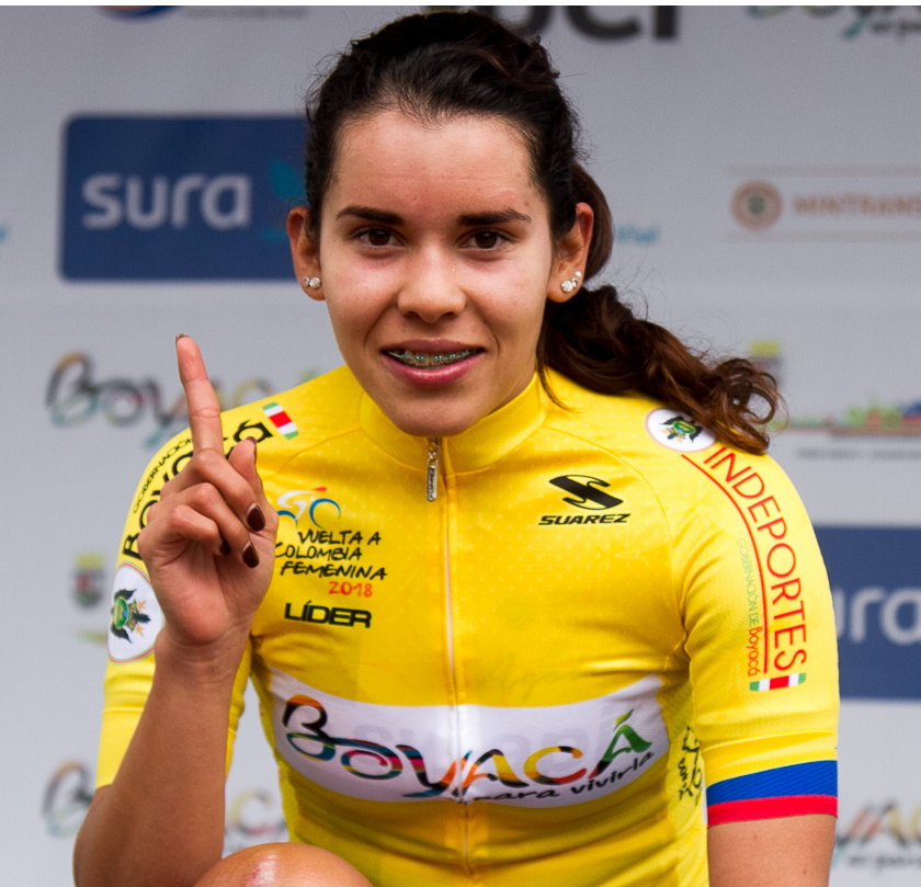 Brenda Santoyo en la primera etapa de la Vuelta a Colombia Femenina 2018